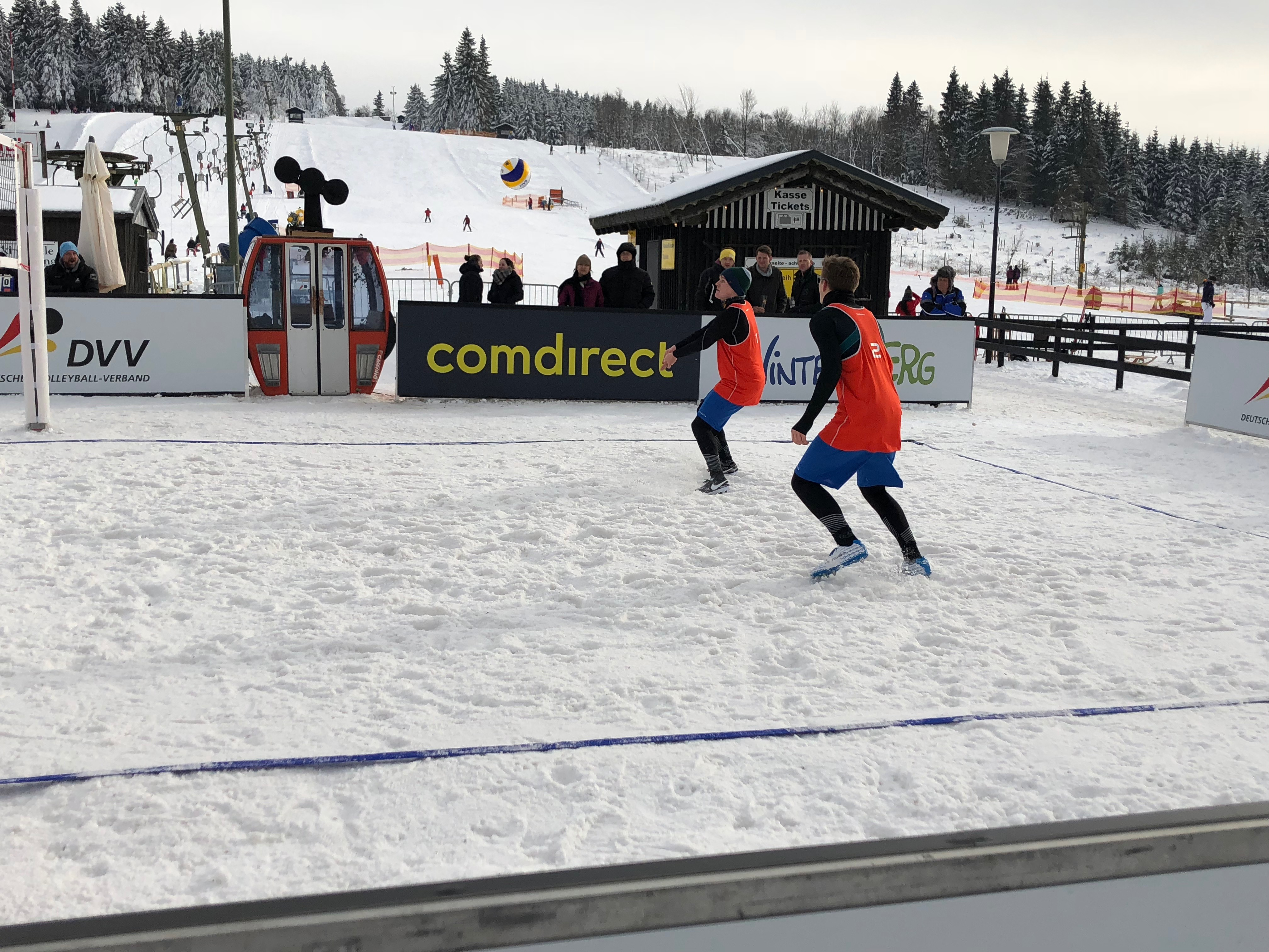 Team Adler/Richter bei der 1. Deutschen Meisterschaft in Winterberg.